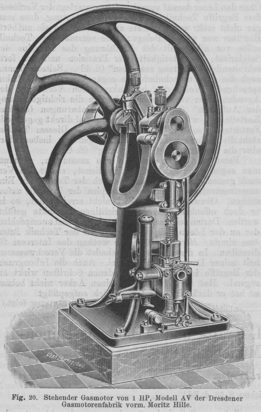 Stehender Gasmotor von 1 HP, Modell AV der Dresdener Gasmotorenfabrik vorm. Moritz Hille